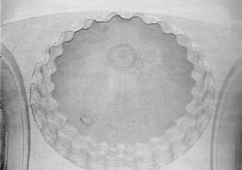 Cúpula del interior de la Iglesia Santa María de la Meza